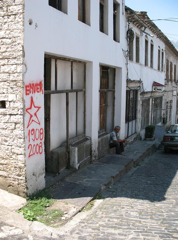 Graffiti in Gjirokastër